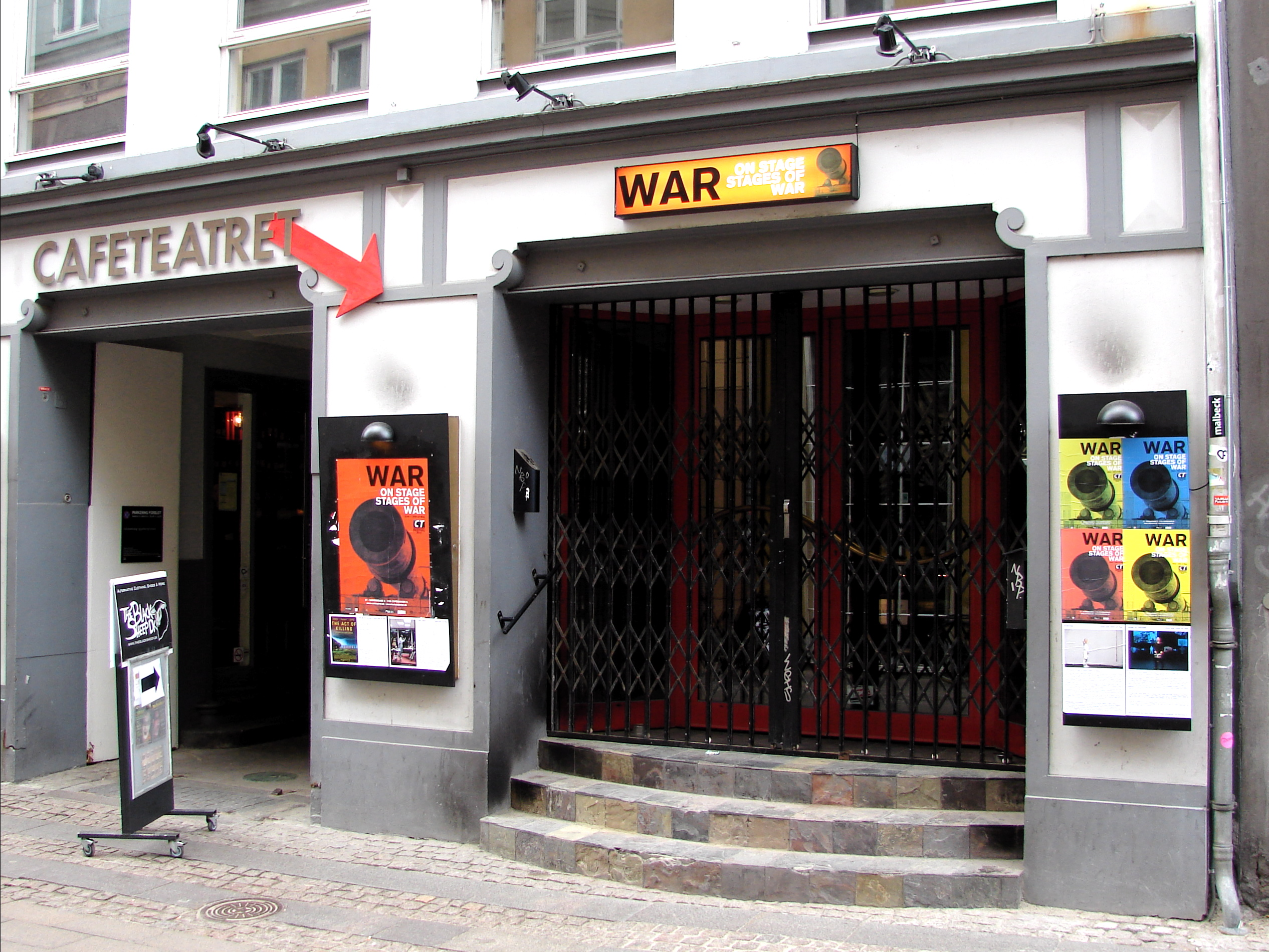 Café Teatret, København